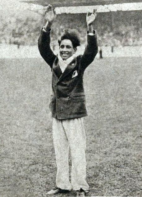 Ahmed El Ouafi (JO 1928), 'Montreal 76', Panini figurina n°50.